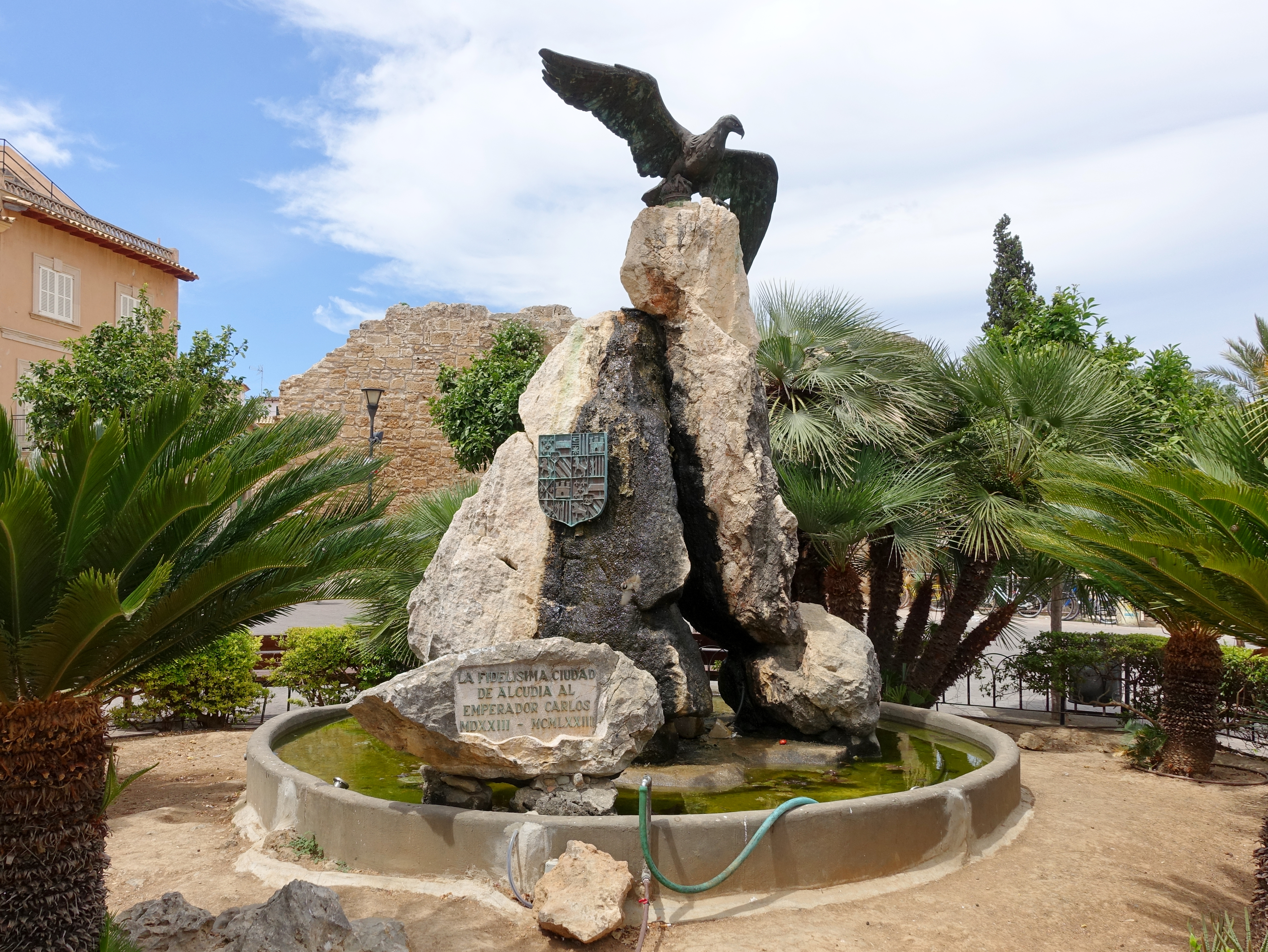 Denkmal für Kaiser Karl V., als Karl I. König von Spanien, in Alcúdia, Mallorca, Spanien